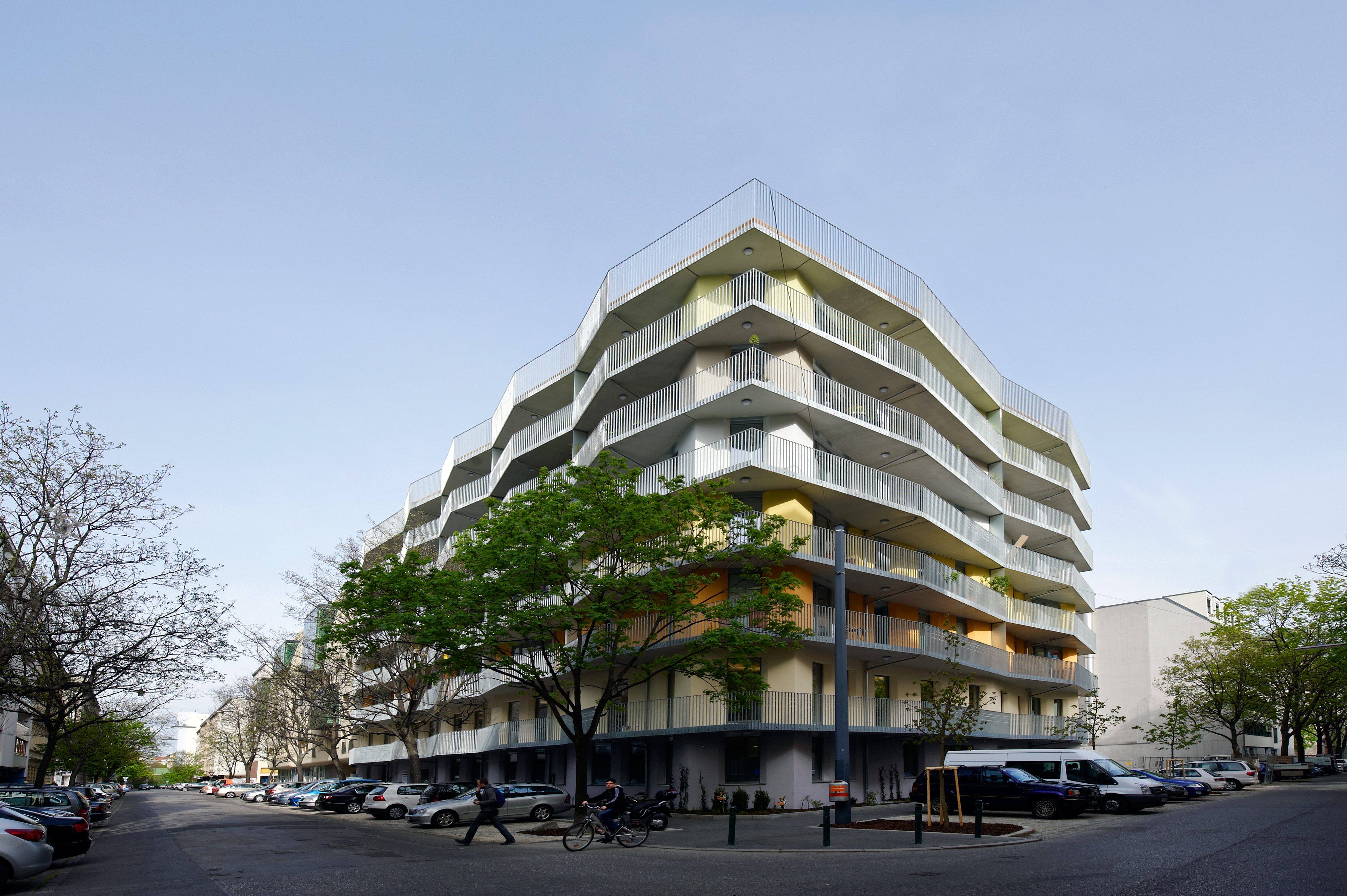 Wohngebäude U31, Universumstraße Wien